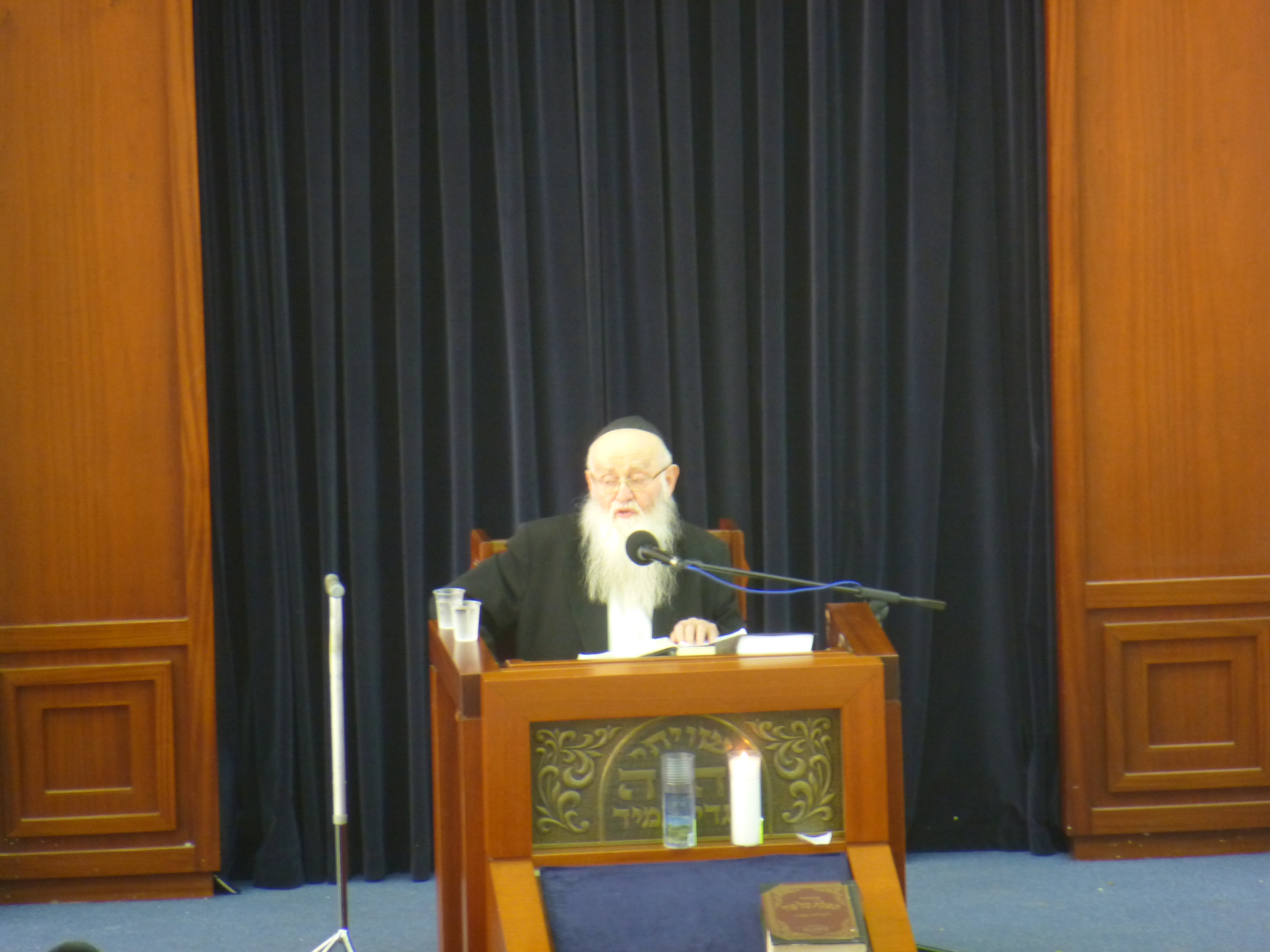 הרב רפאל שמואלביץ מוסר שיעור כללי בישיבת מיר ברכפלד